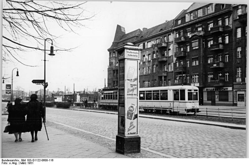 Berlin, Prenzlauer Allee, Straßenbahn Zentralbild Berlin im März 1951 Blick in die Prenzlauer-Allee in der Höhe der Zelter Straße.